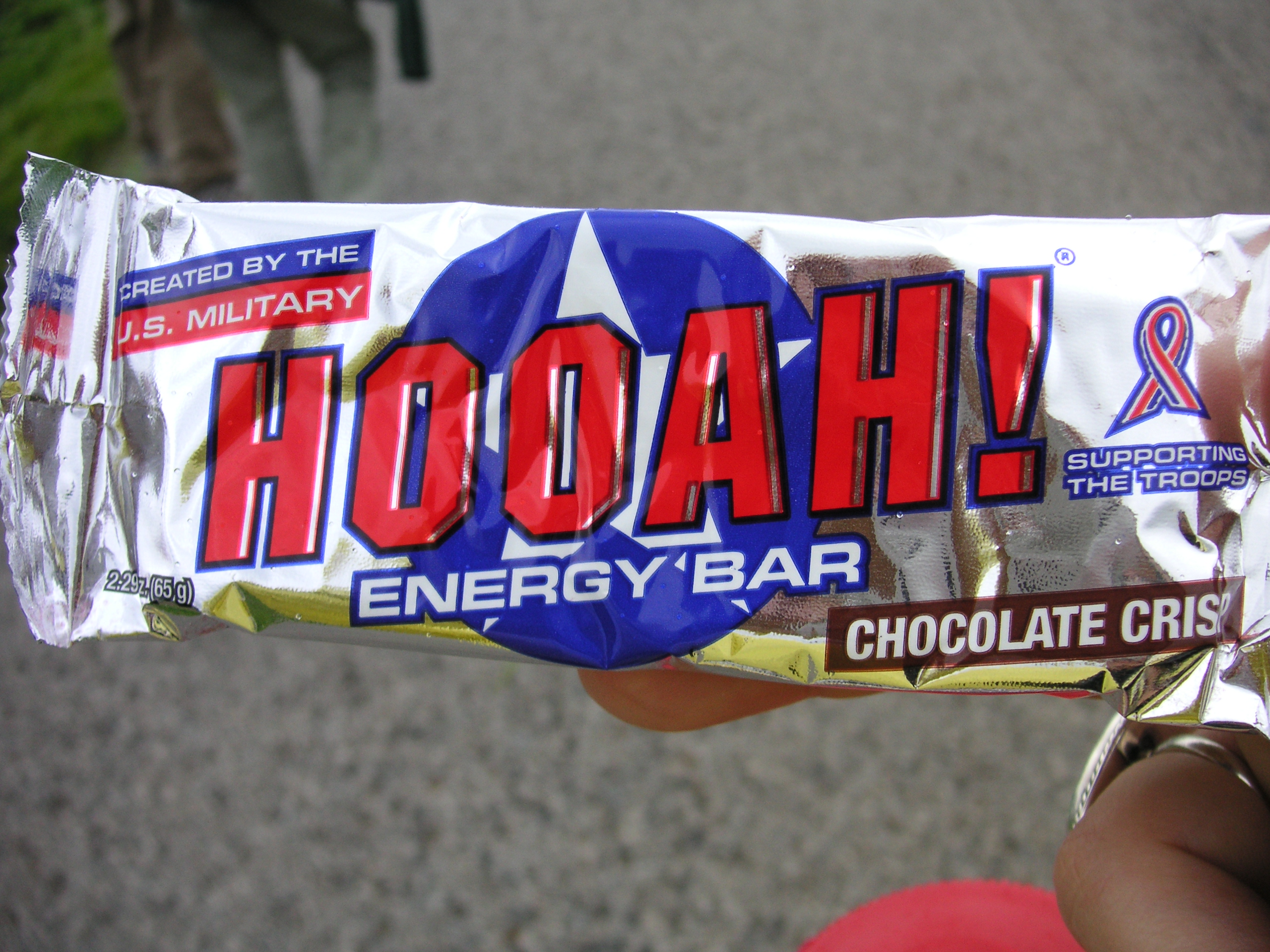 A HOOAH! Bar